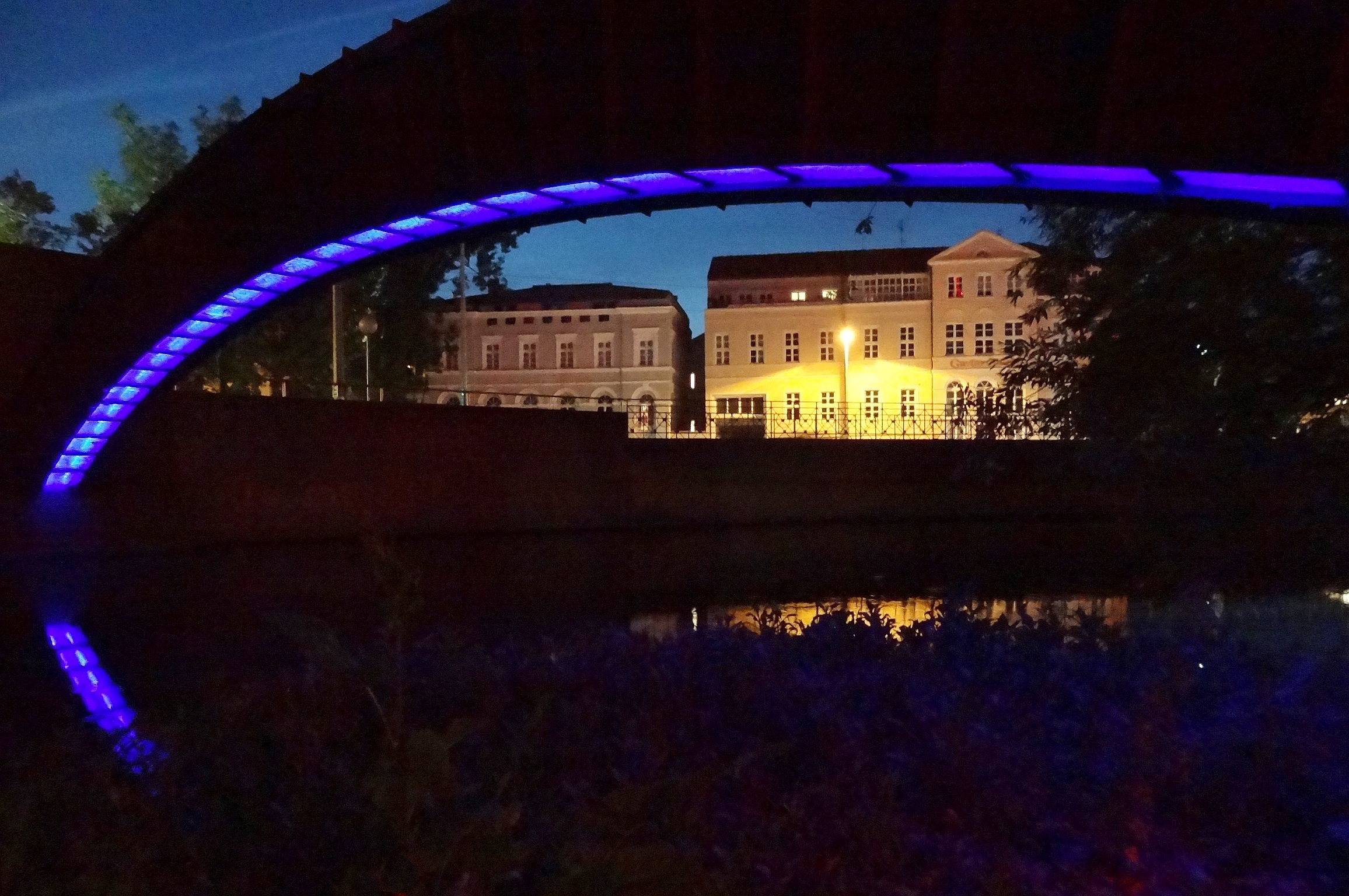 "Bogen der Erinnerung" des italienischen Lichtkünstlers Fabrizio Plessi am Abend.